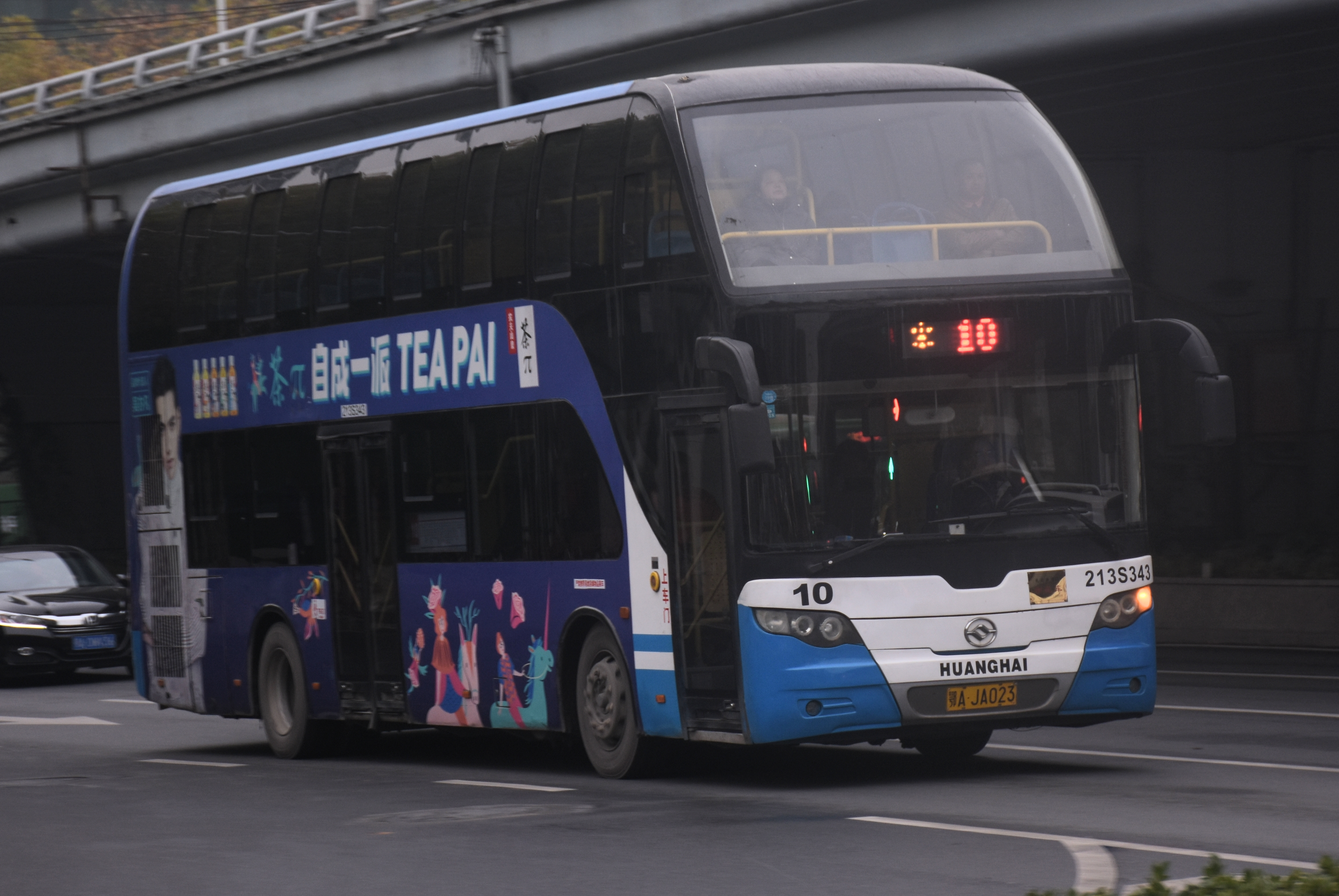 配属10路的黄海客车DD6119B11（自编号213S343）途经武胜路